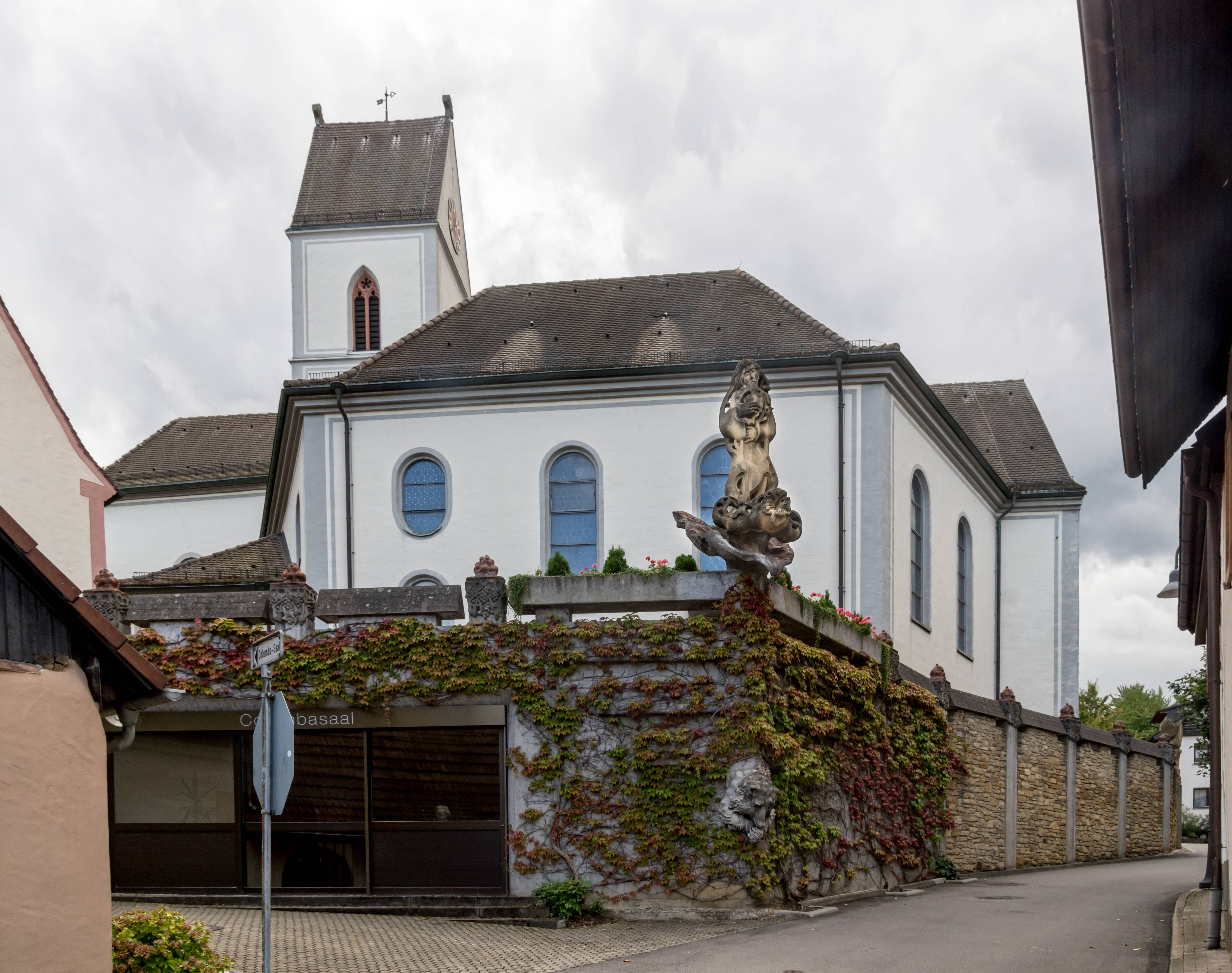 Bilder von St. Columba. in Pfaffenweiler